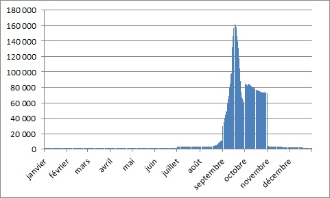 Volume de "contrats vendanges" au cours de l'année 2009